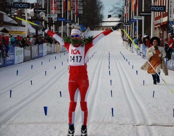 Emma Ribom vinner ungdomsvasan 2013